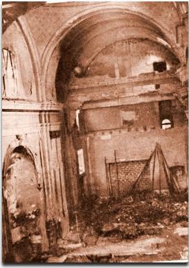 Vista de la Iglesia de San Francisco de Buenos Aires incendiada el 16-6-1955 por manifestantes.